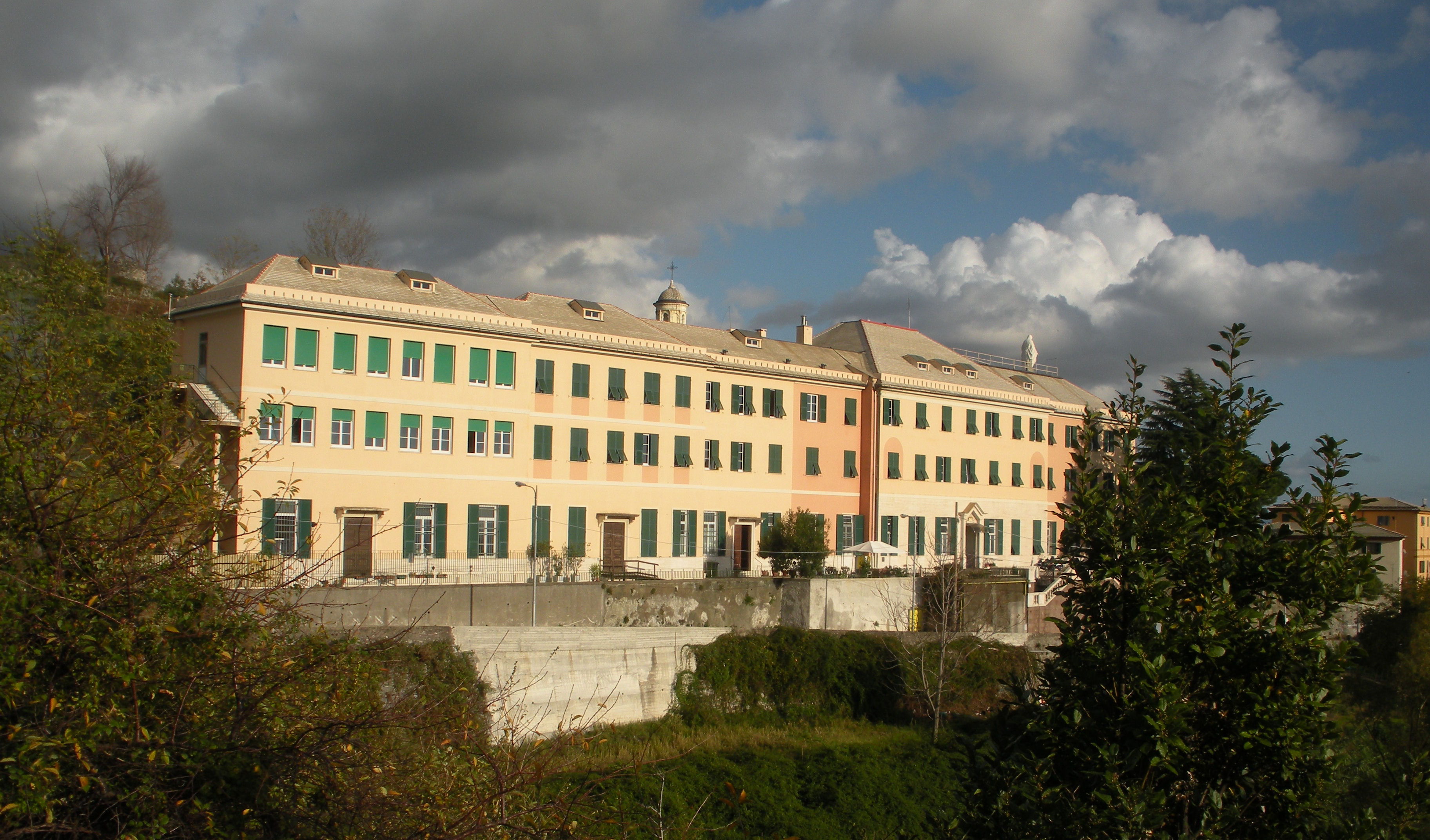 Genova, quartiere di Cornigliano, la villa De Ferrari Galliera sulla collina di Coronata, oggi casa di riposo villa Immacolata